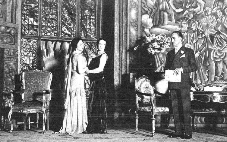 Los actores Irene López Heredia, Irene Barroso y Mariano Asquerino en una escena del estreno de la obra de teatro La prima Fernanda, de Manuel y Antonio Machado